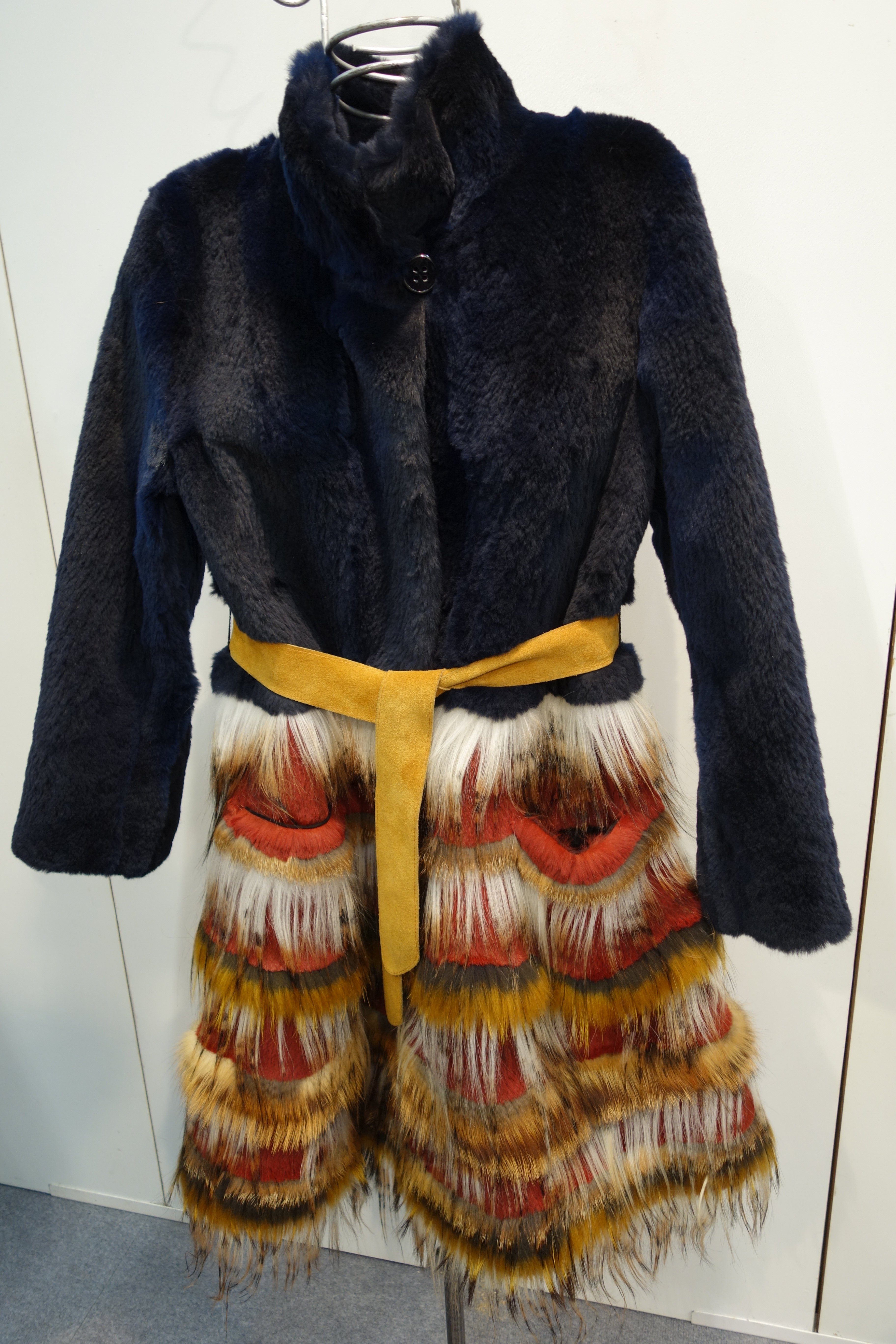 International German Red Fox Award 2014 des Zentralverbands des deutschen Kürschnerhandwerks. Mantel aus geschorenen und gefärbten europäischen Rotfuchsfellen, Teilapplikation naturfarbener Dachs und Rotfuchs, Ledergürtel. Design und Realisation Samabor Pelz & Modedesign, Regensburg. Die Firma erhielt bei diesem Wettbewerb die „Auszeichnung für hervorragende modische Leistung“. Ein Wettbewerb zur Förderung der Nutzung der einheimischen Felle, insbesondere der Rotfuchsfelle. Teilnahmeberechtigt waren die Mitglieder des Zentralverbands des deutschen Kürschnerhandwerks und die Kürschner Österreichs, der Schweiz und der Niederlande. Es war der dritte derartige Wettbewerb, der erste fand im Jahr 2011 statt. Sponsoring u. a. durch die Zeitschrift „Wild und Hund“, Messe „Jagd und Hund“. Anlässlich und auf der Messe „Jagd und Hund“, Dortmund Westfalenhallen, 3. bis 9. Februar 2014. Das Sponsoring beinhaltete die Zurverfügungstellung von drei kostenlosen Rotfuchsfellen pro Teilnehmer.